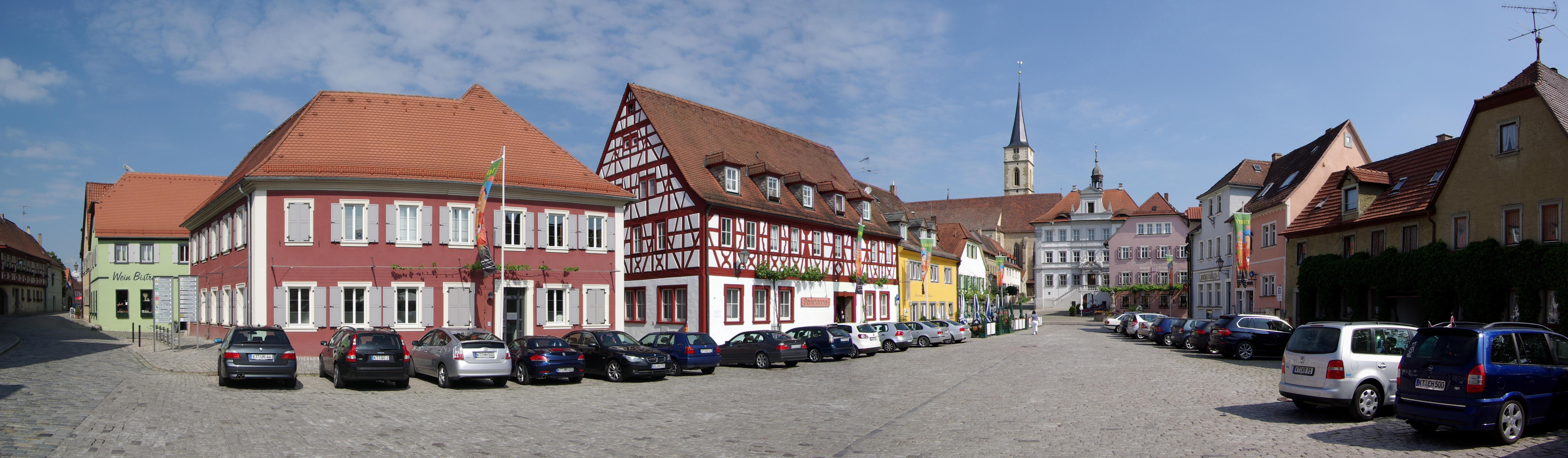 Iphofen, Marktplatz Panorama